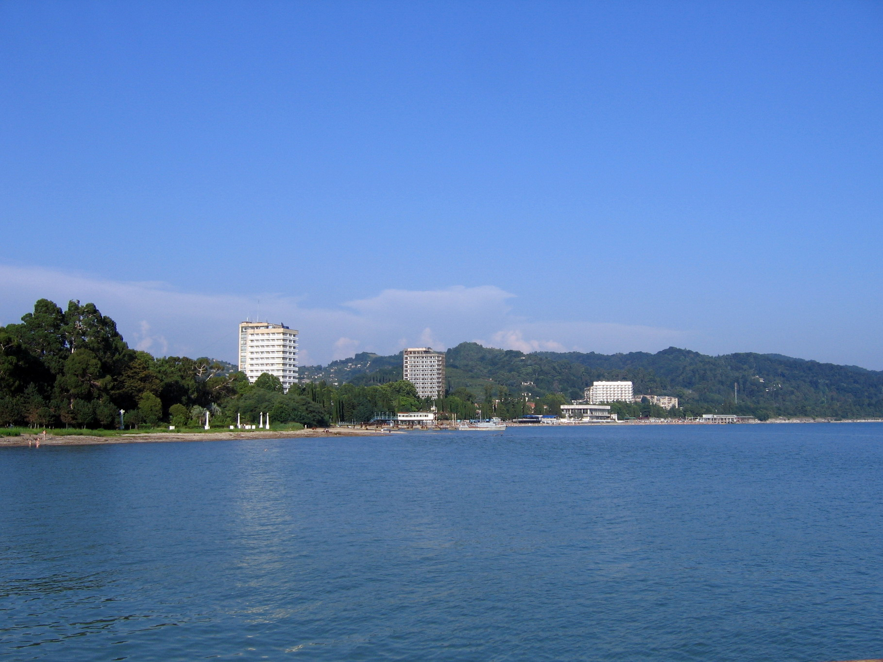 Санаторий Ракетных войск стратегического назначения России в Сухуме. Вид с причала морского порта.